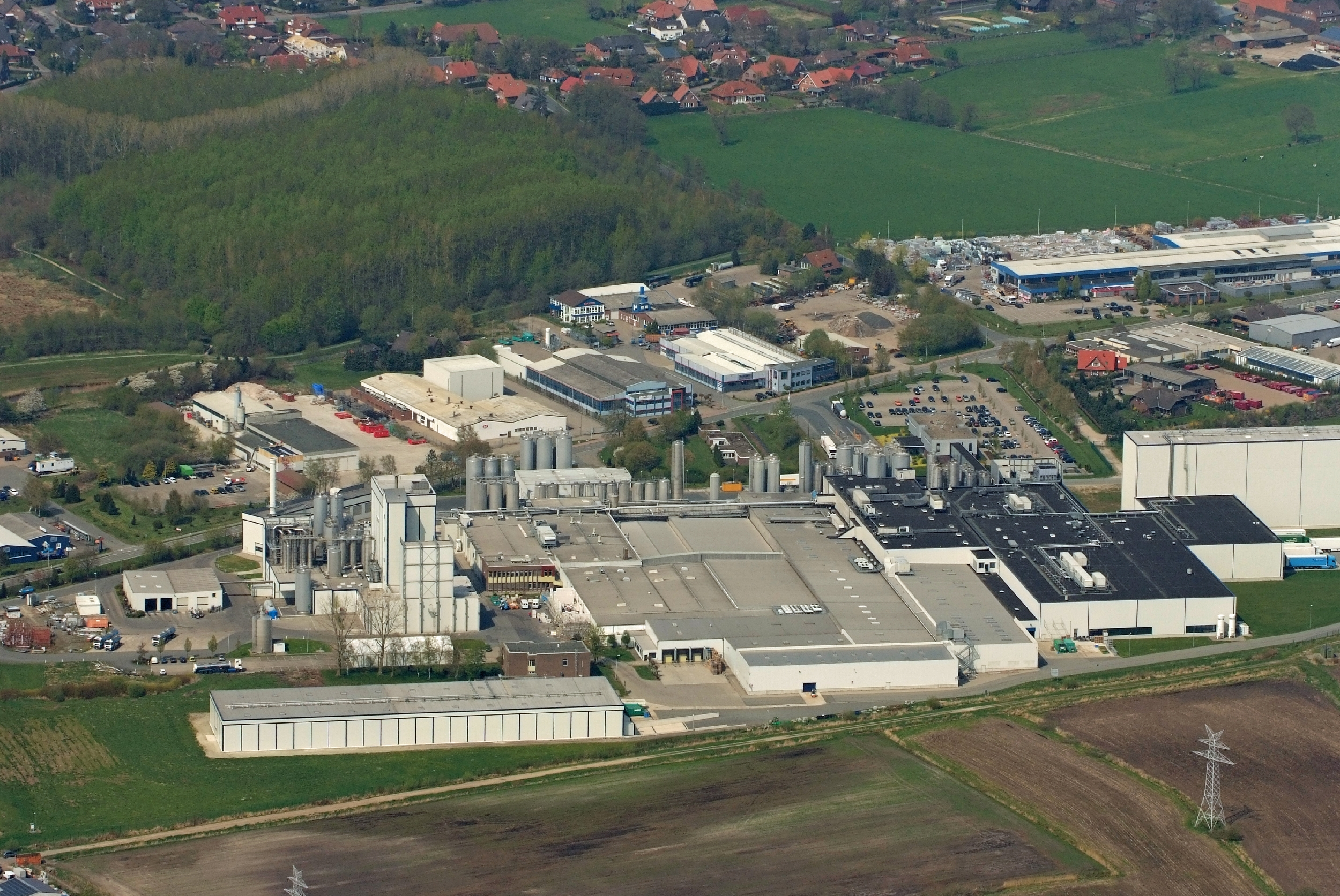 Nordmilch, Edewecht / Fotoflug von Nordholz-Spieka nach Oldenburg und Papenburg